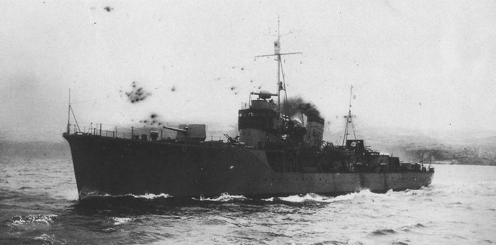 日本海軍 占守型海防艦「隠岐」、東京湾